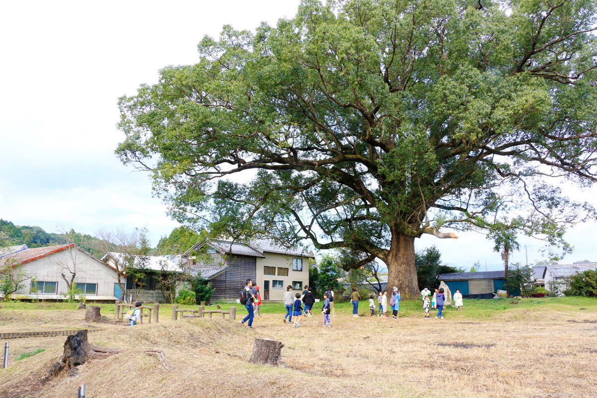 無戸室跡とクスノキの巨木 Canon EOS 70D + EF-S 18-135mm F3.5-5.6 IS STM